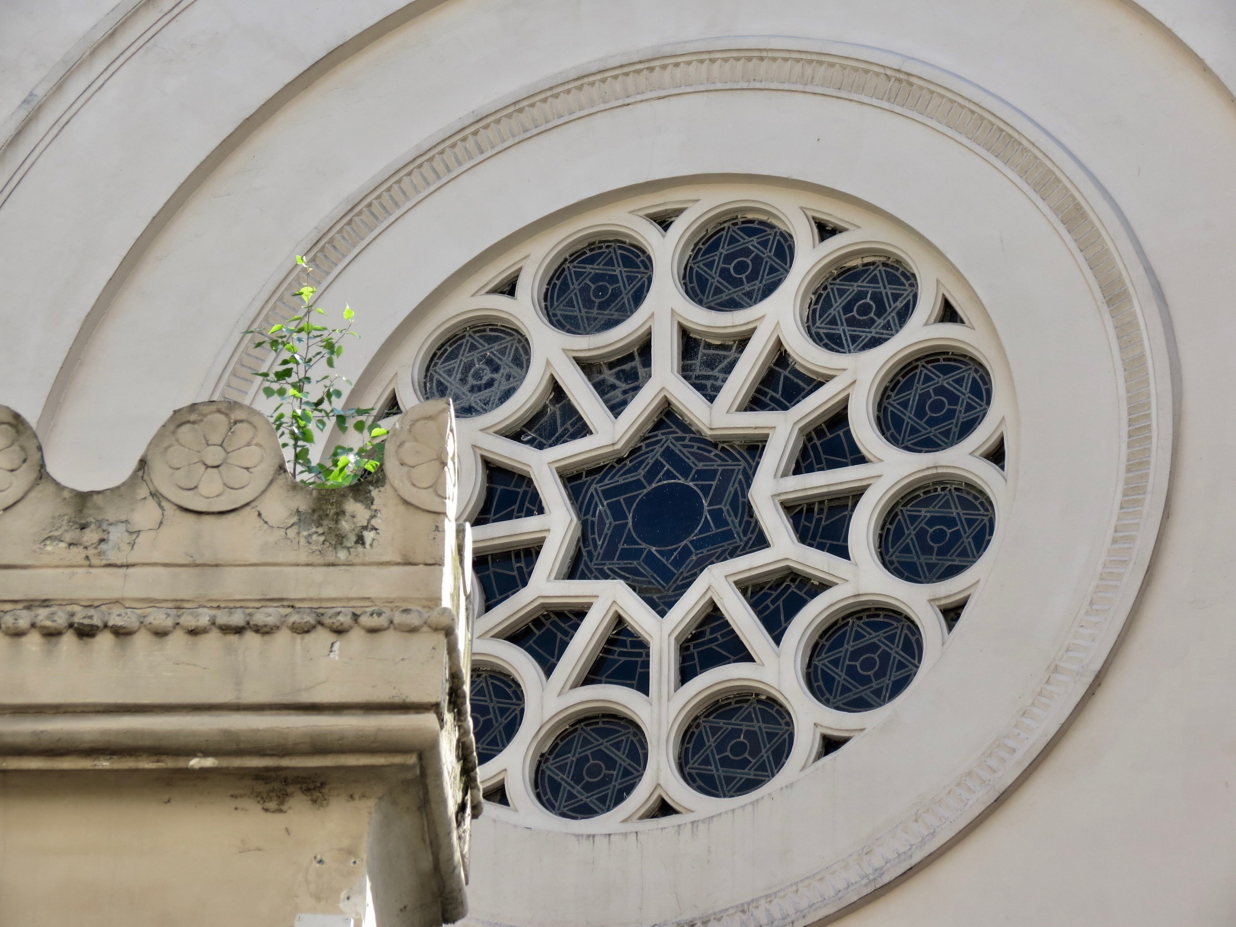 Vitrail du bâtiment principal de la Synagogue Nazareth, derrière le créneau de sa façade.